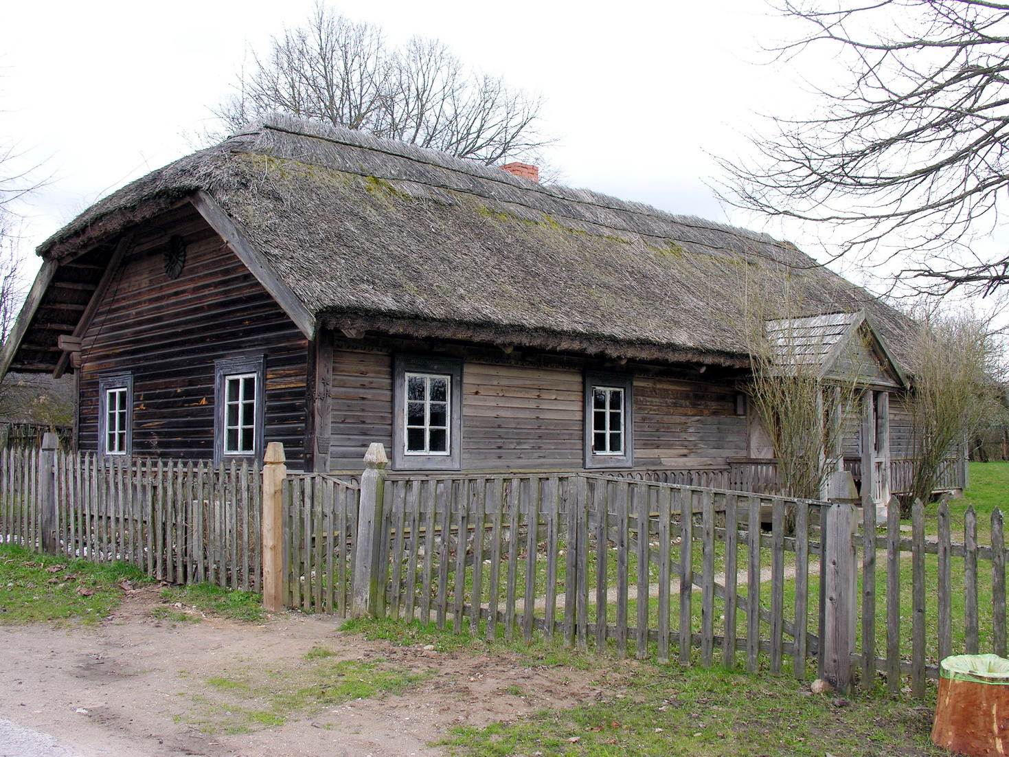 Pirkia 2007 m. balandžio 21 d., Lietuva